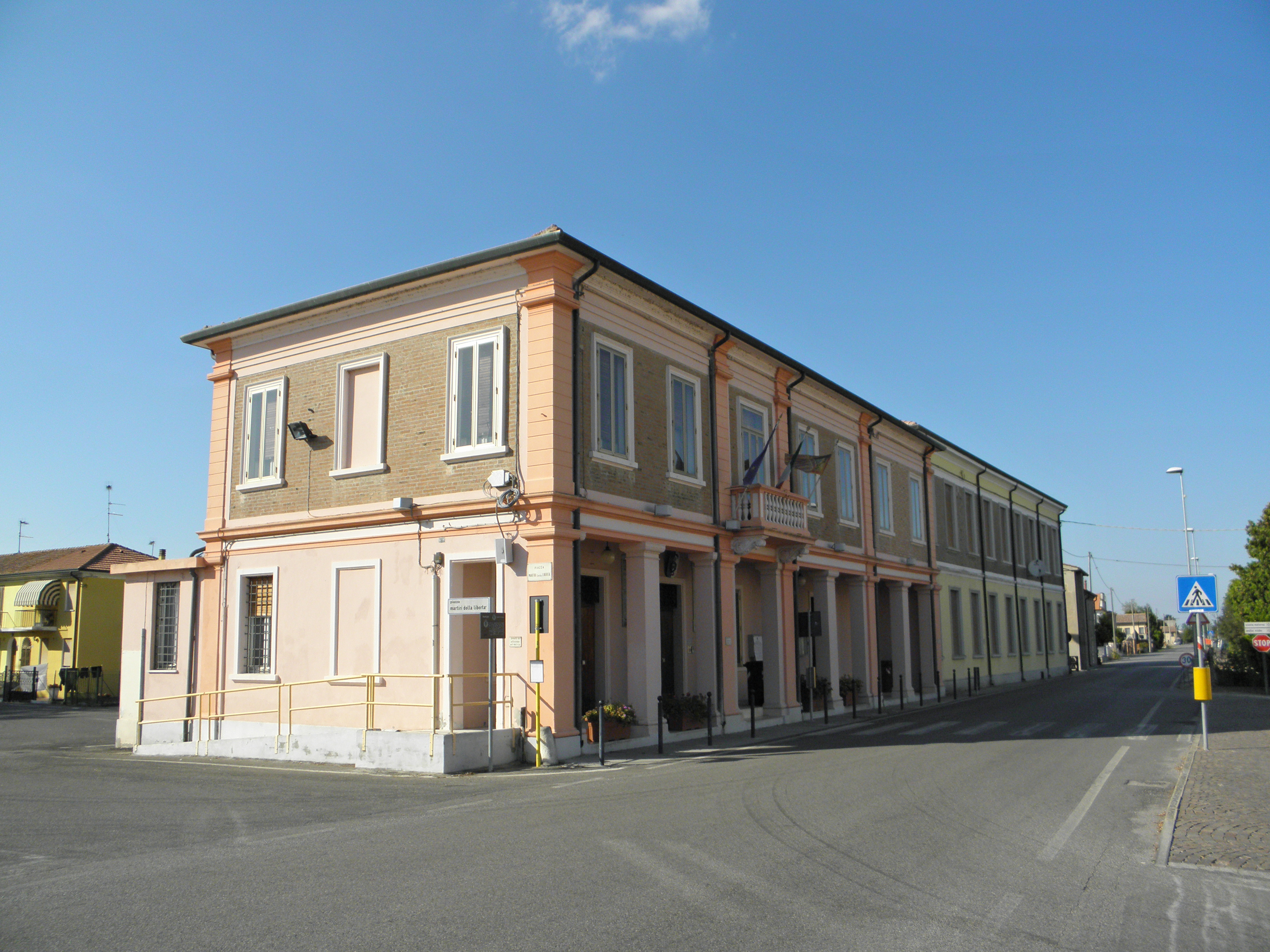 Pincara, la palazzina sede del municipio.